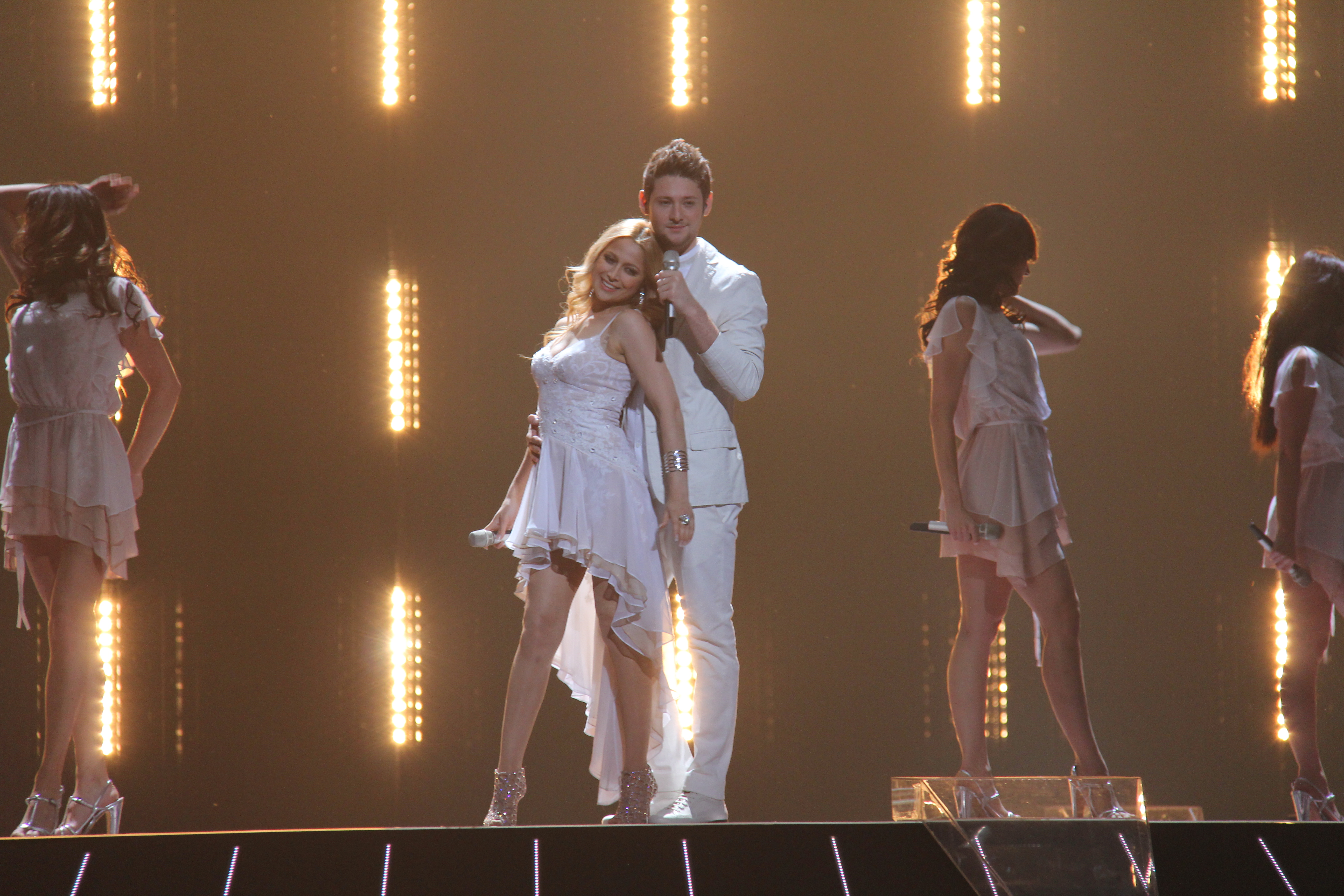 Gewinner des ESC 2011 Aserbaidschan